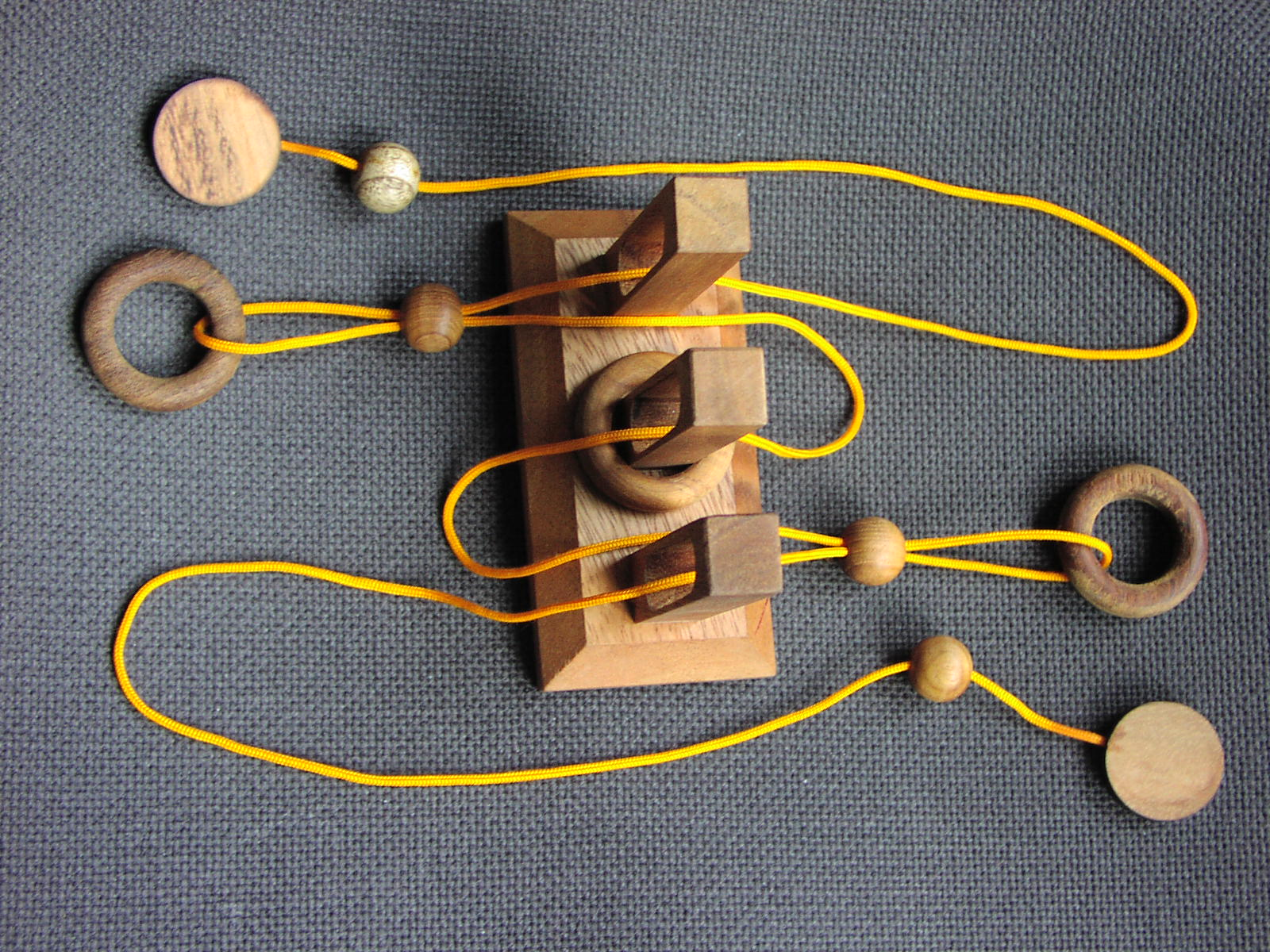 Ördöglakat kötéllel és karikákkal. A cél a középső karika levétele.